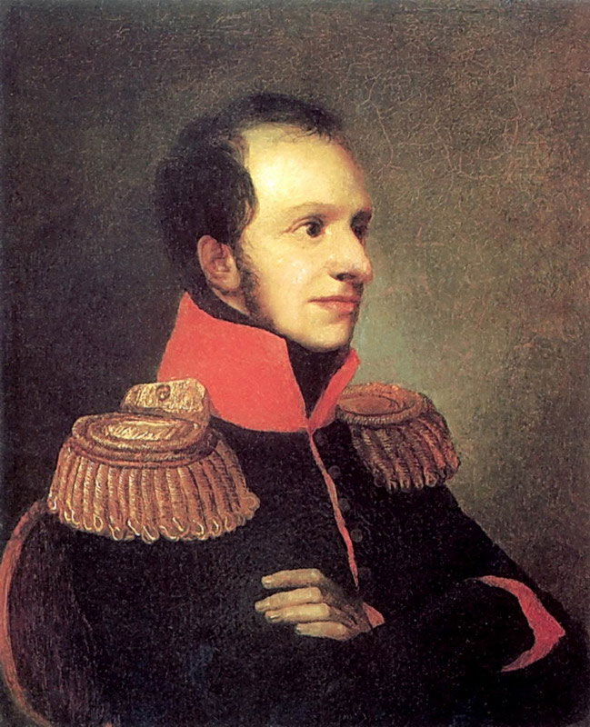 Портрет принца Г. П. Ольденбургского